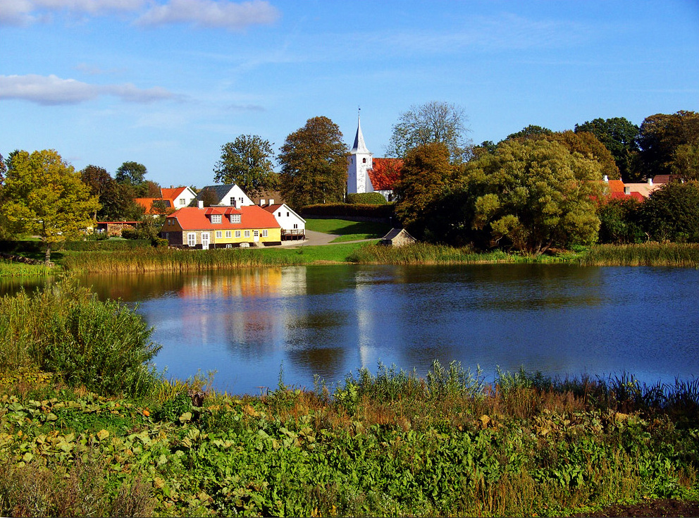 Agri (Syddjurs)